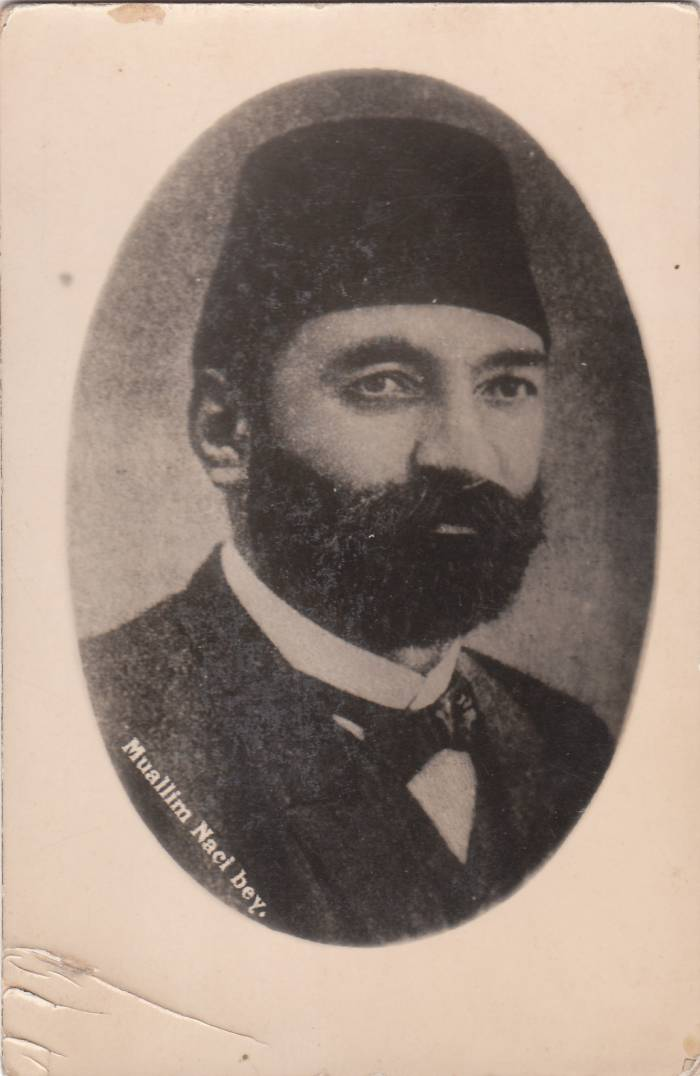 Muallim Naci (d. 1850, İstanbul - ö. 1893, İstanbul), Türk yazar, şair, öğretmen, eleştirmen.